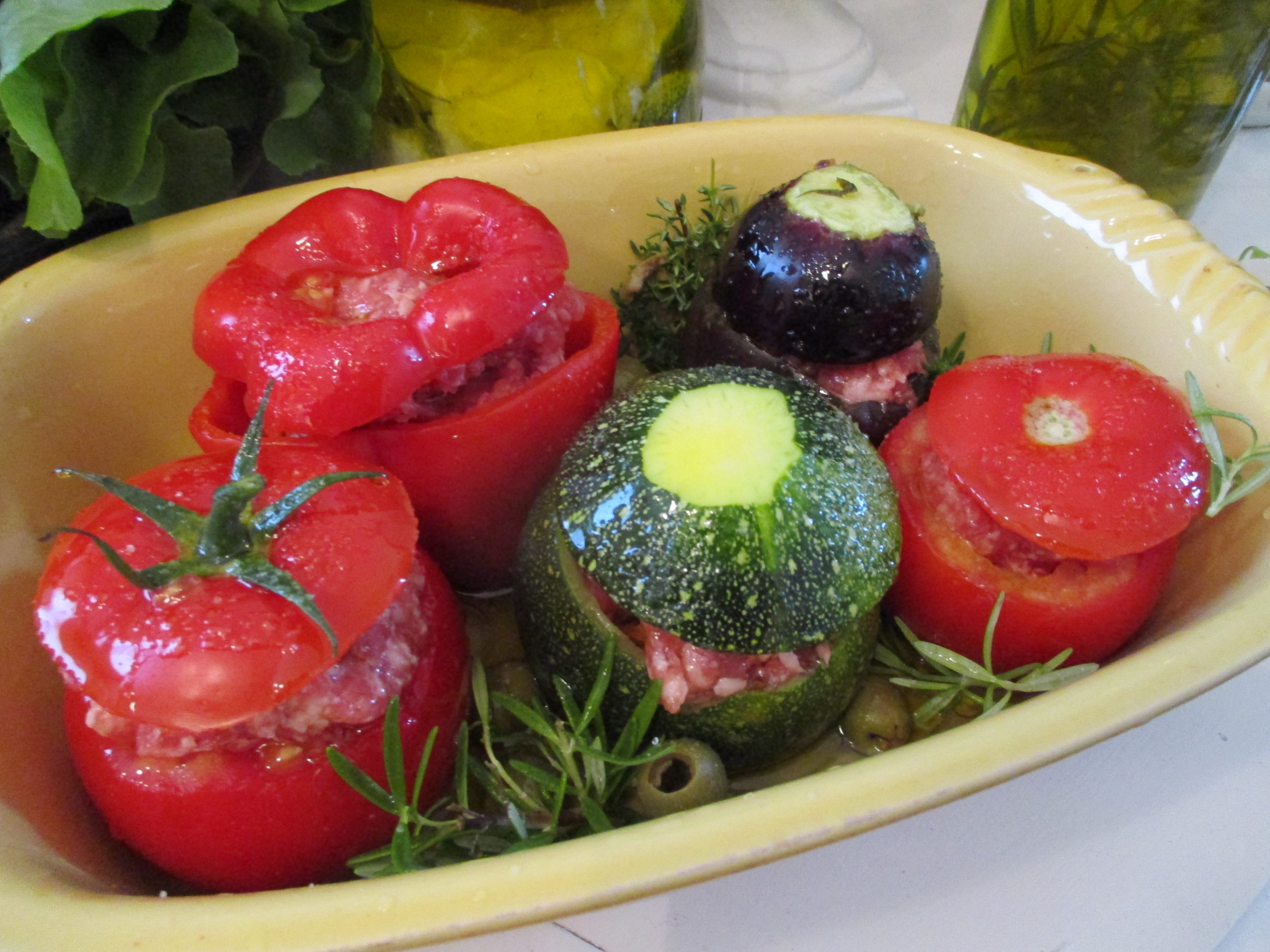 Petits farcis de Provence